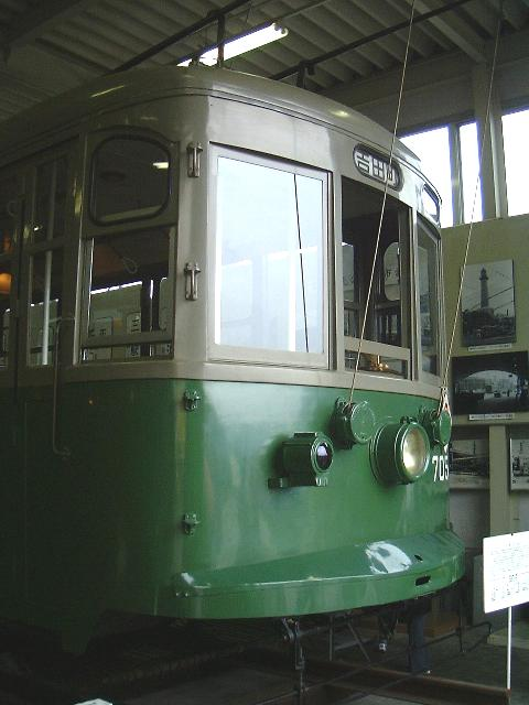 神戸市電705